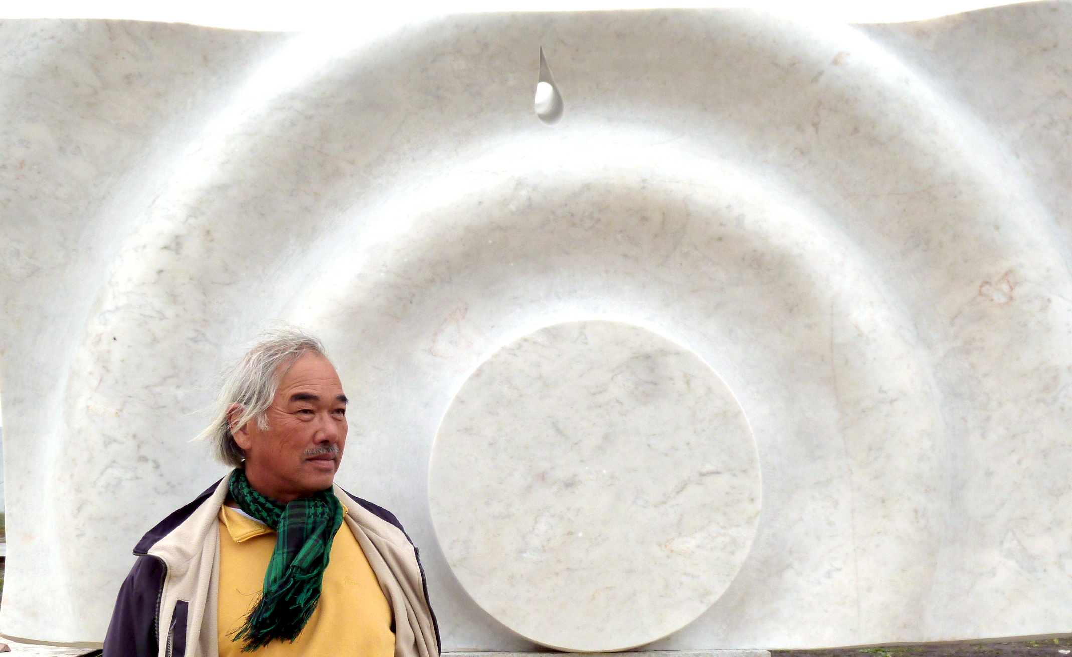 1948年宮崎県生まれ イタリアを代表する日本人彫刻家